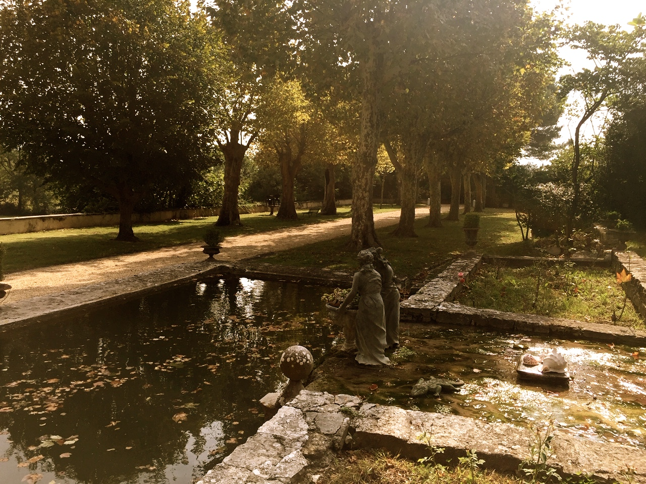 Une des pièces d'eau du parc du château de La Brillanne.